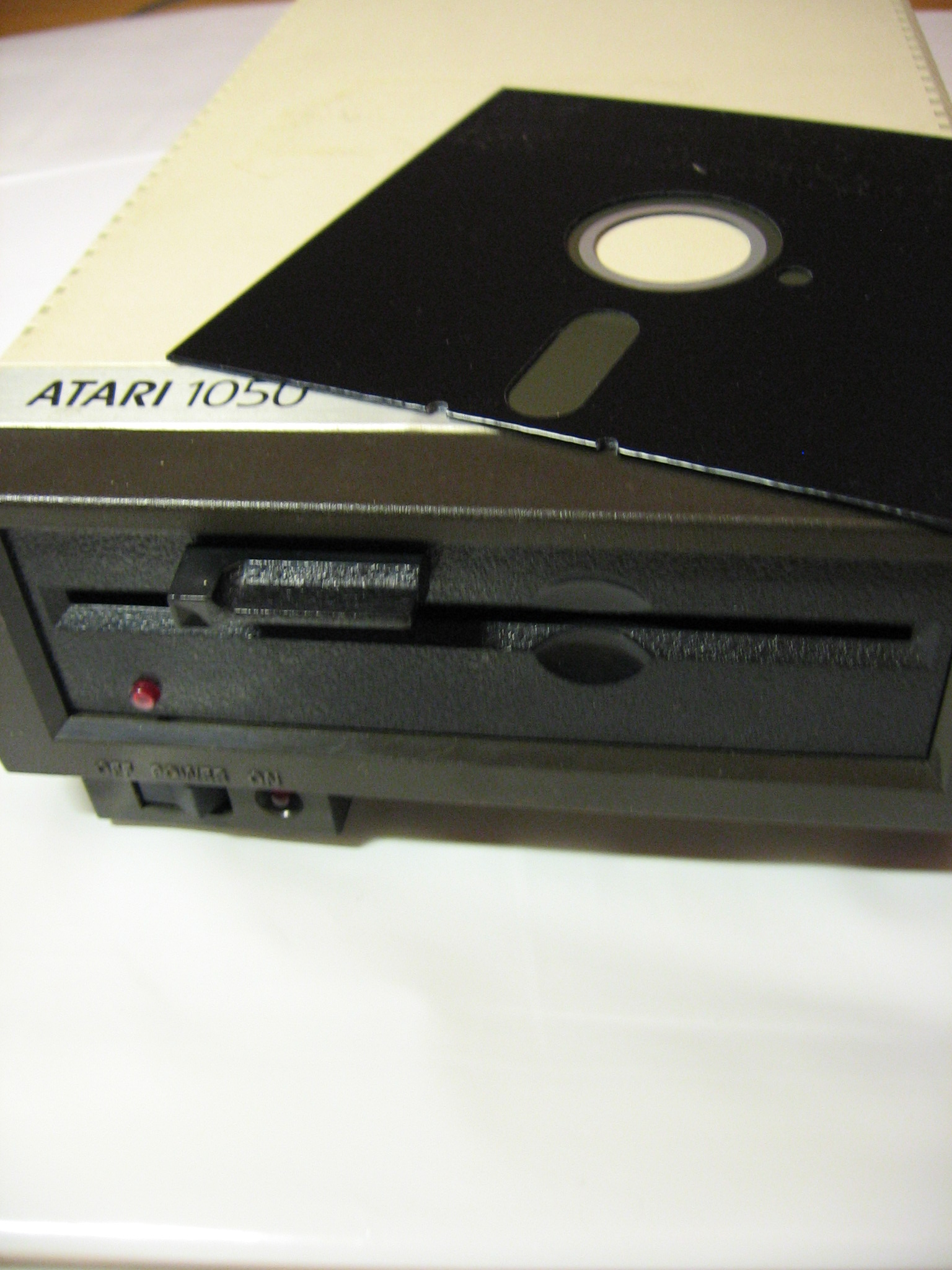 Atari 1050 - передняя панель